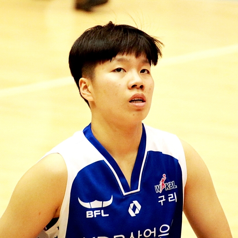 160205 여자농구 KDB생명 vs 신한은행 퓨처스